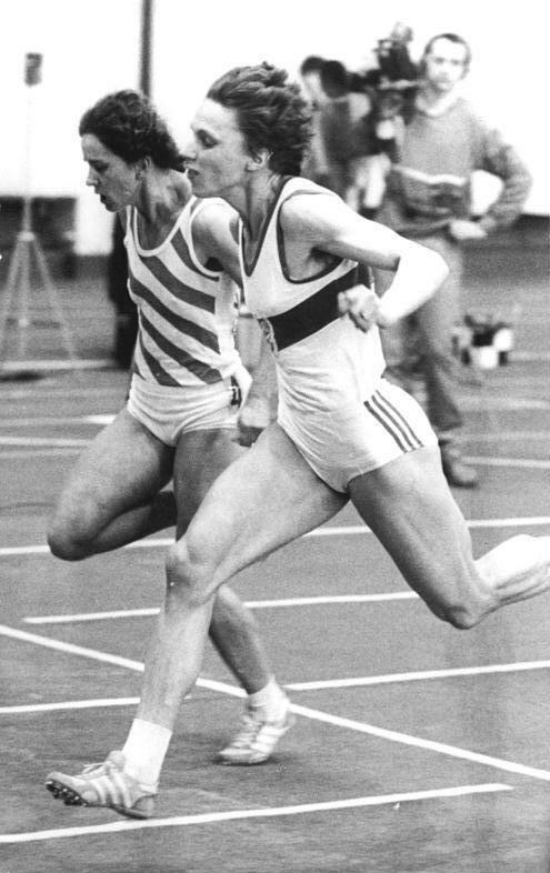 Marita Koch, Marlies Göhr ADN-ZB Hiekel 17.2.85-fre-Dresden: Leichtathletik-Hallenmeisterschaften - Die 28jährige Medizinstudentin Marita Koch (r.), vom SC Empor Rostock, stellte bei den DDR-Hallen-Meisterschaften in Senftenberg mit 10,25 s eine neue Hallenweltbestleistung über 100 Yards auf. Die Rostockerin verbesserte die alte Weltbestleistung von Marlies Göhr (1. SC Motor Jena) um vier Hundertstel Sekunden.